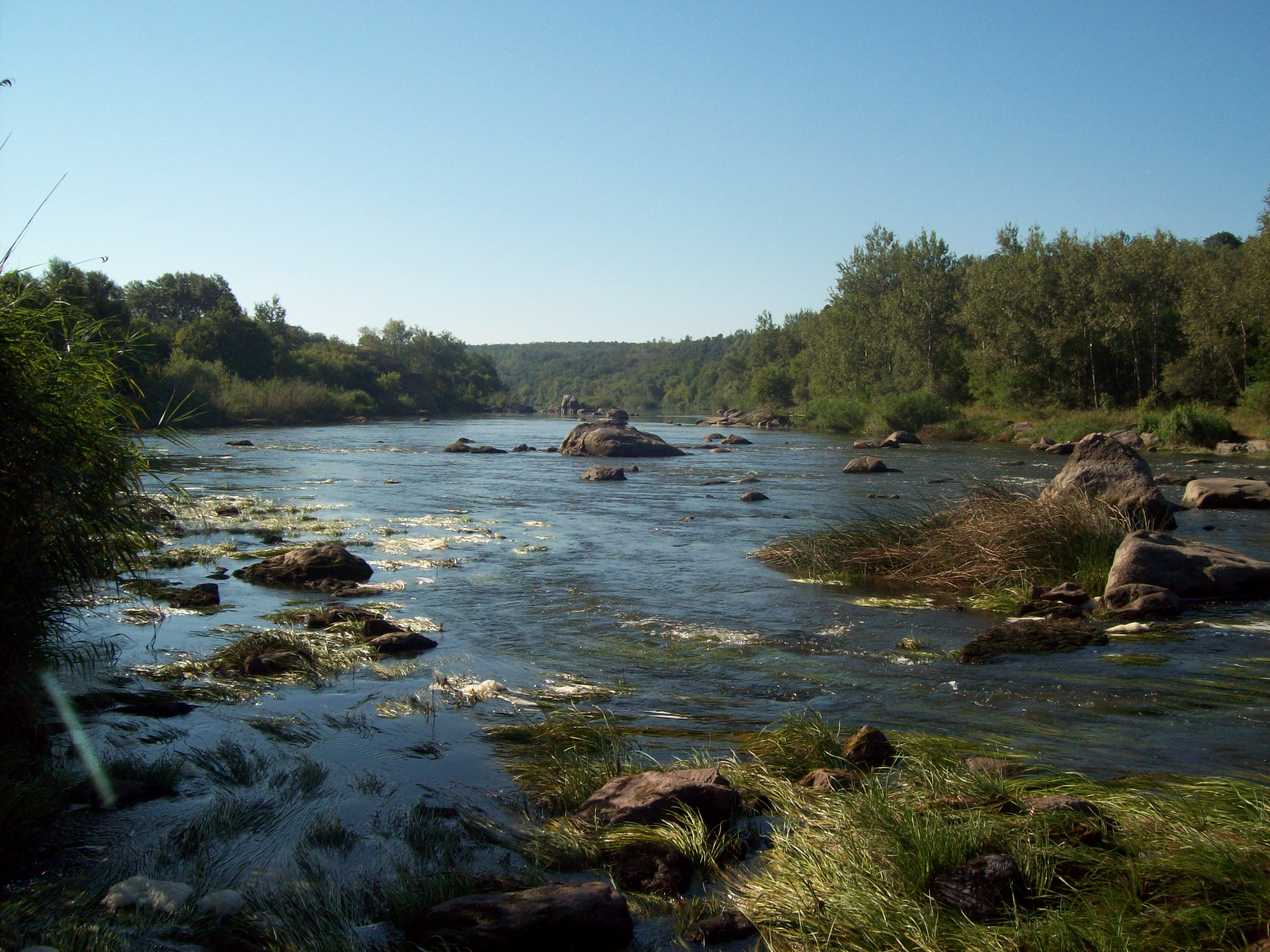 Відпочинок на П. Бугу - фото з порогів, видно камінь "Слон"